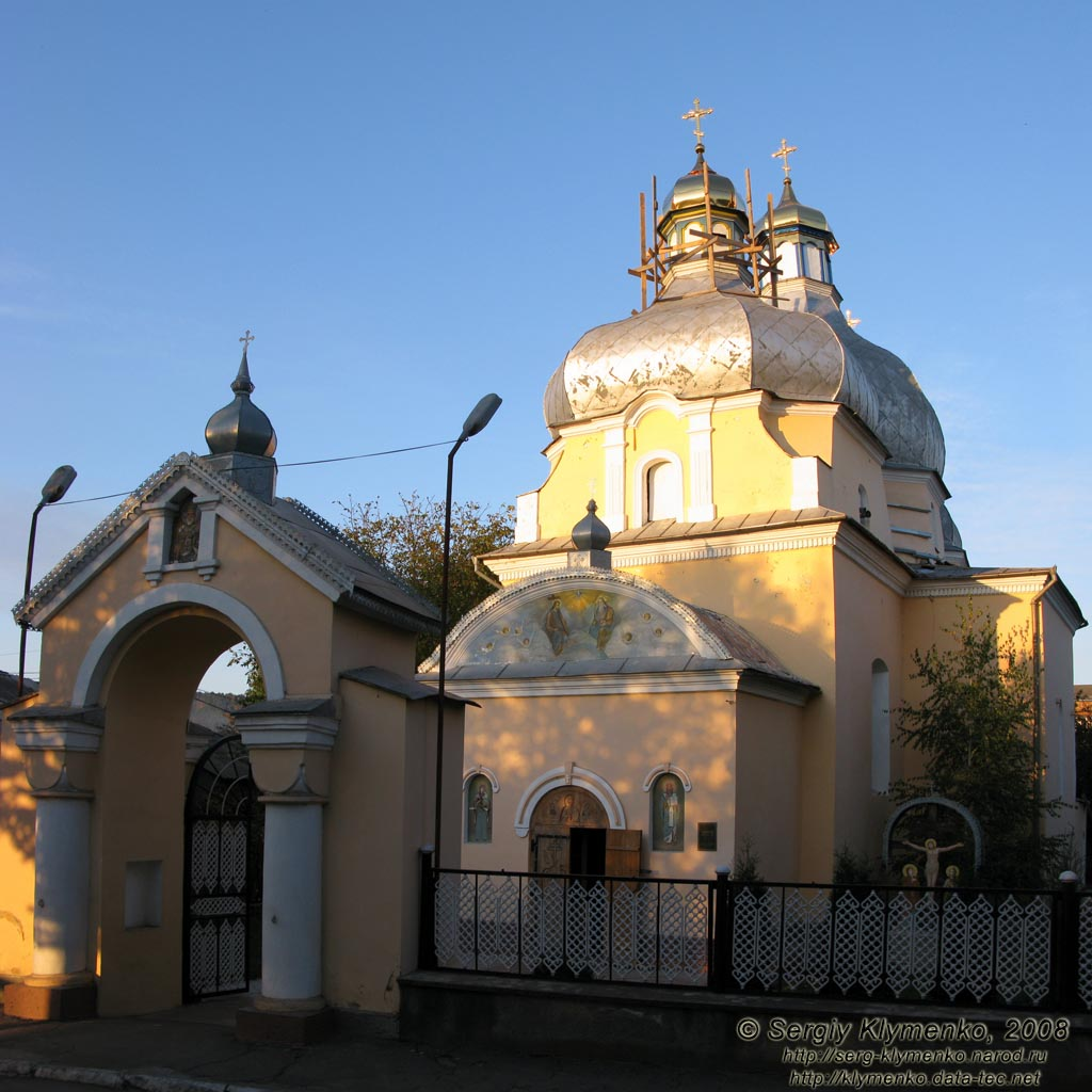 Миколаївський собор у місті Могилів-Подільському (Вінницька область), жовтень 2008 року